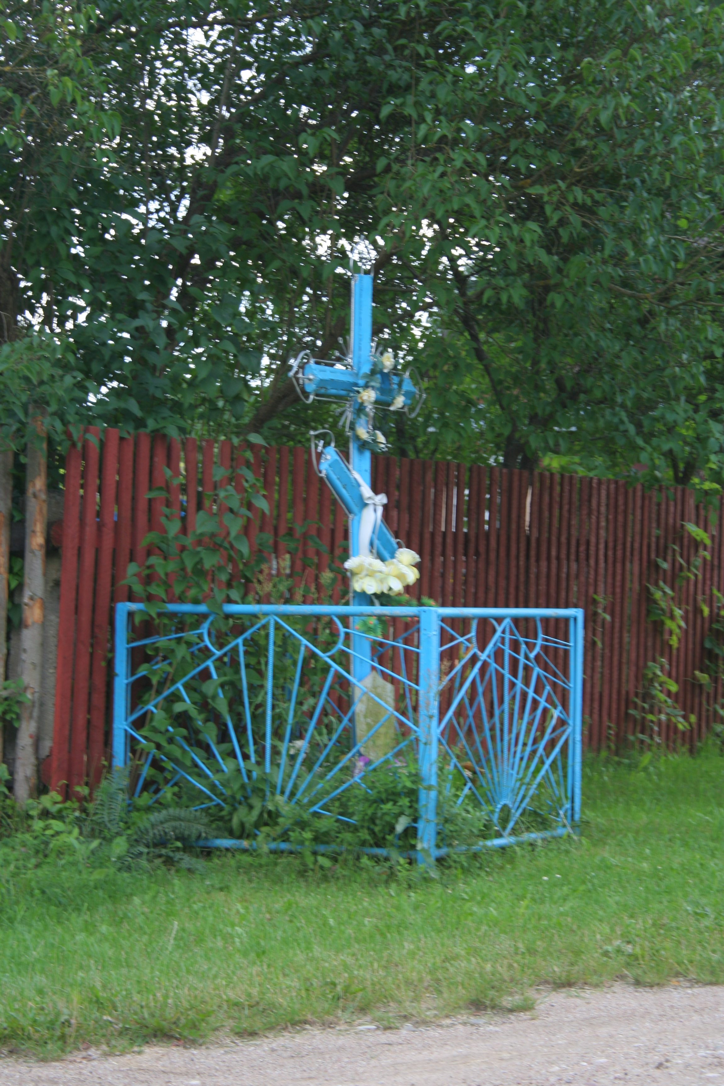 Krzyż przydrożny w Opace Dużej.